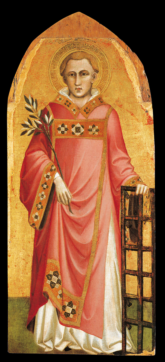 Saint Lawrence